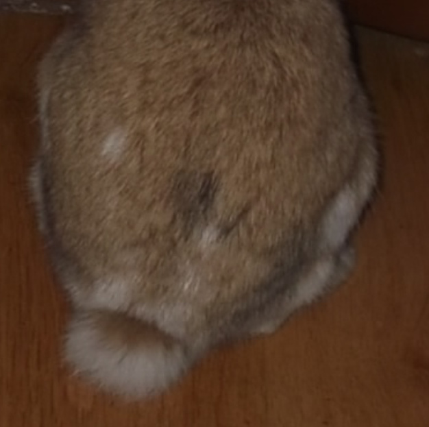 Ogon królika